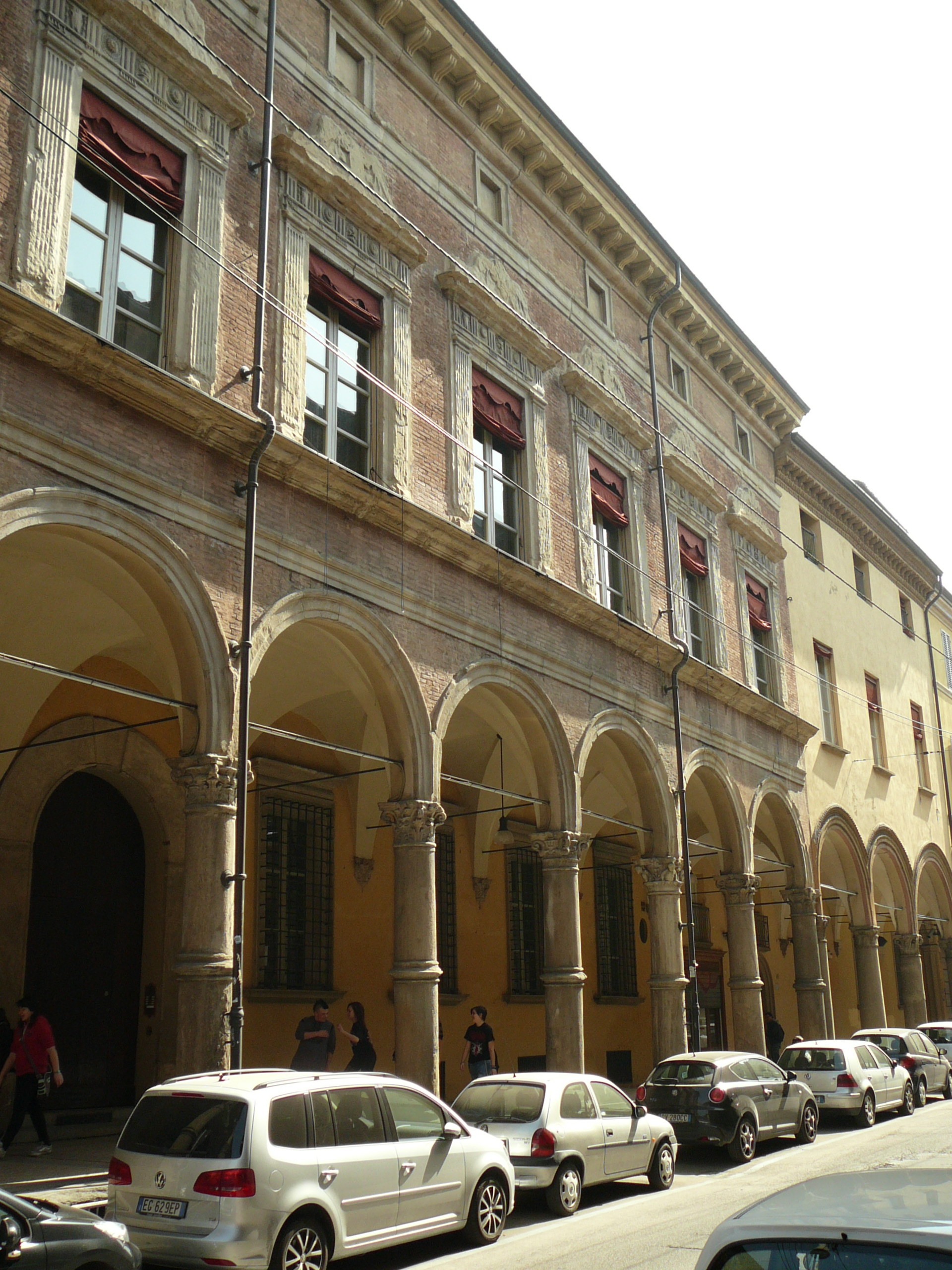 Prospetto di palazzo Bonasoni in via Galliera, 2, Bologna, Italia